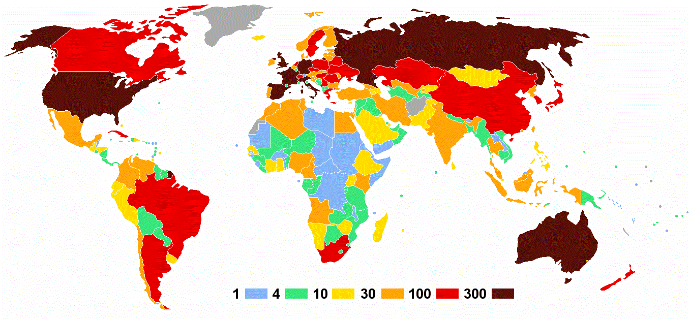 Olympische Sommerspiele 2000 — Anzahl der Athleten